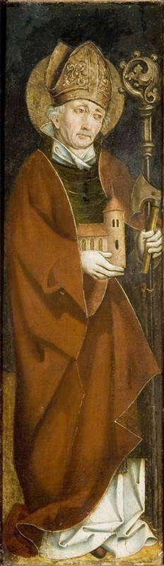 Saint Wolfgang